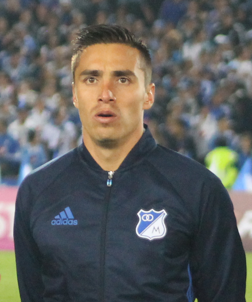 Henry Rojas con Millonarios en 2017.